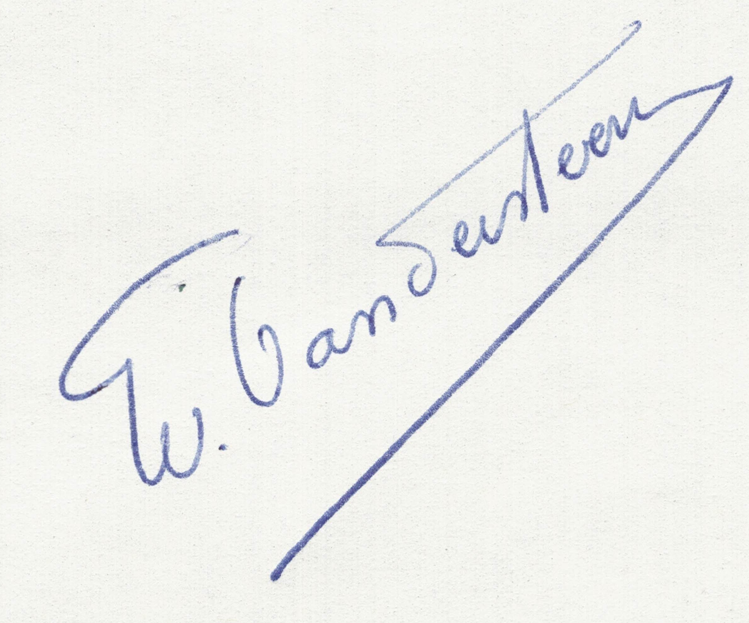 Signatur Vandersteen von einer Weihnachtskarte 1968 an die Übersetzerin ruth-elisabeth